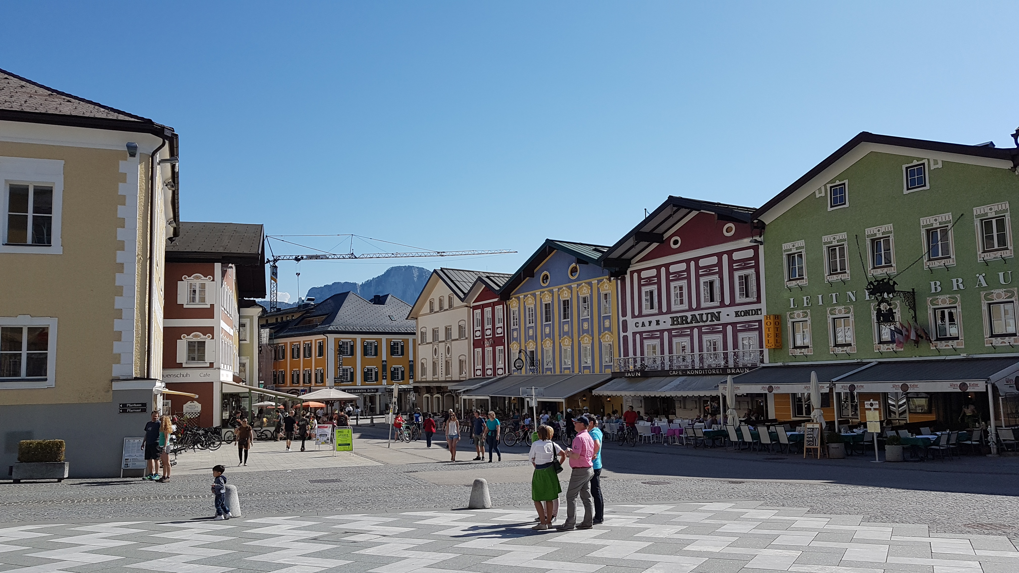 Markt Mondsee (am Mondsee), Marktplatz vom nordöstlich gelegenen ehem. Schloß/Kloster.